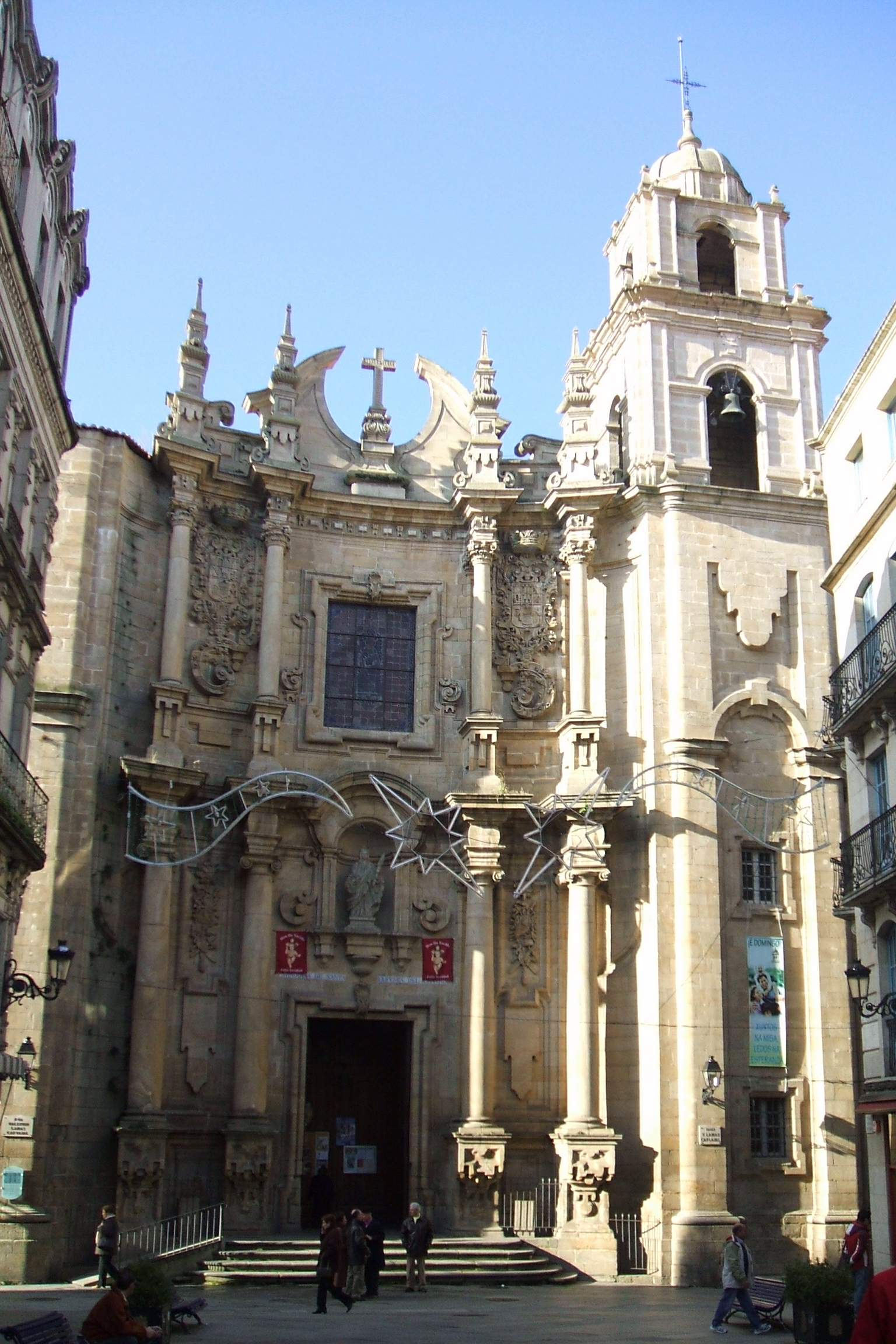 Iglesia de Santa Eufemia (Ourense, Galicia)